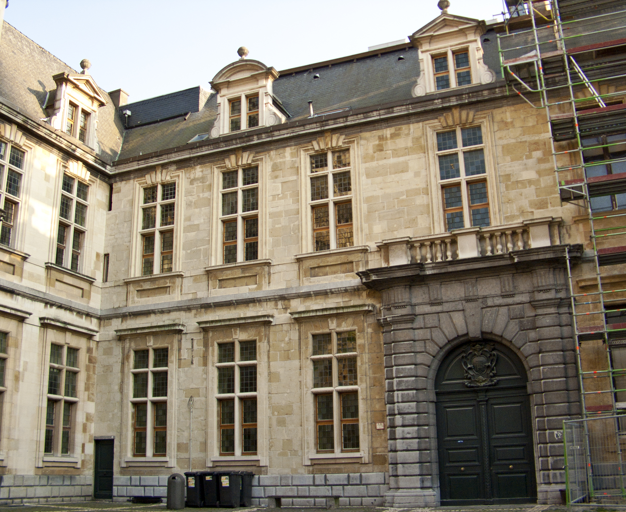 Huis van Aecken: pastorie Carolus Borromeuskerk